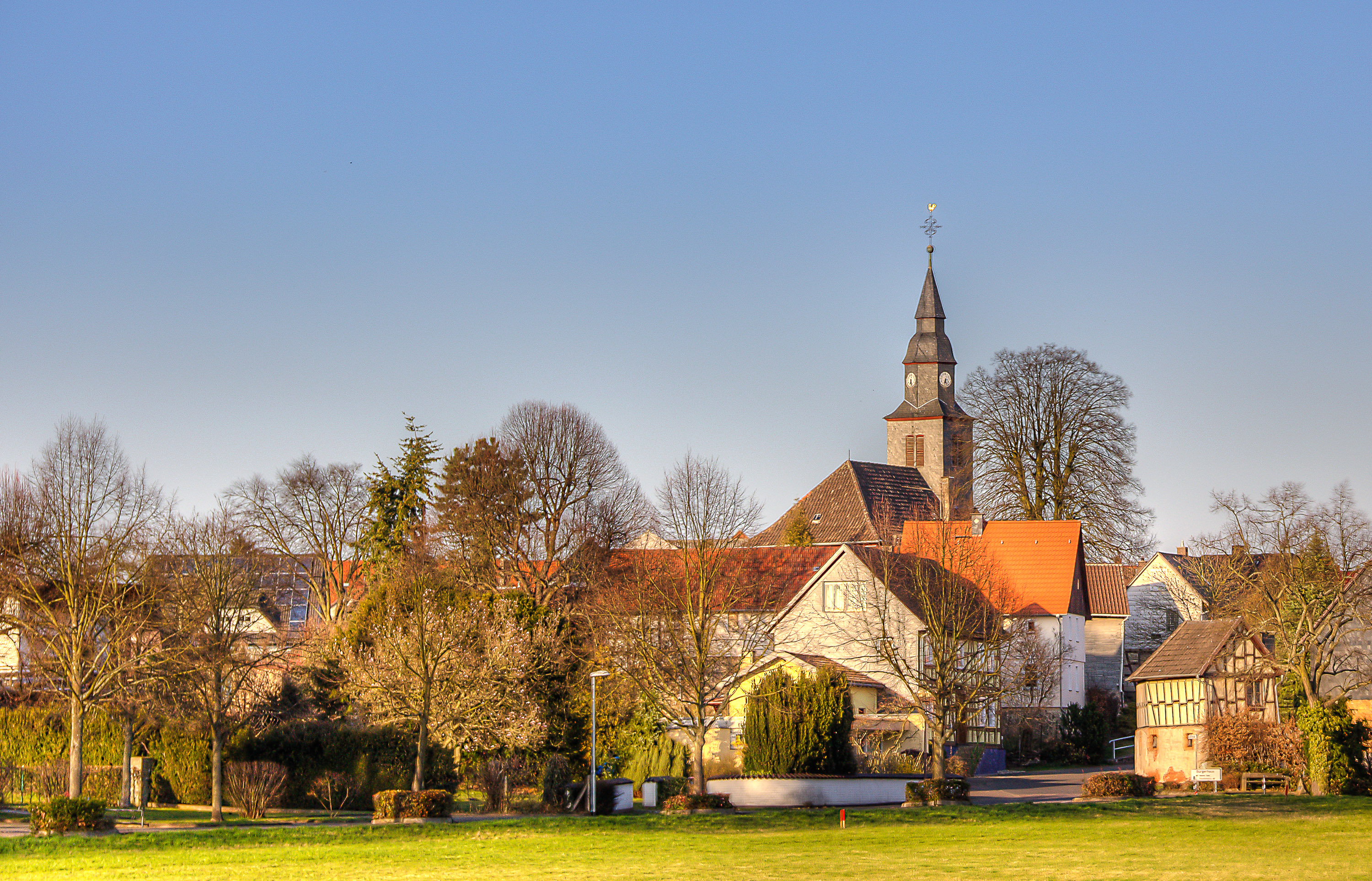 Albach, Gemeinde Fernwald, Landkreis Gießen in Hessen, Deutschland